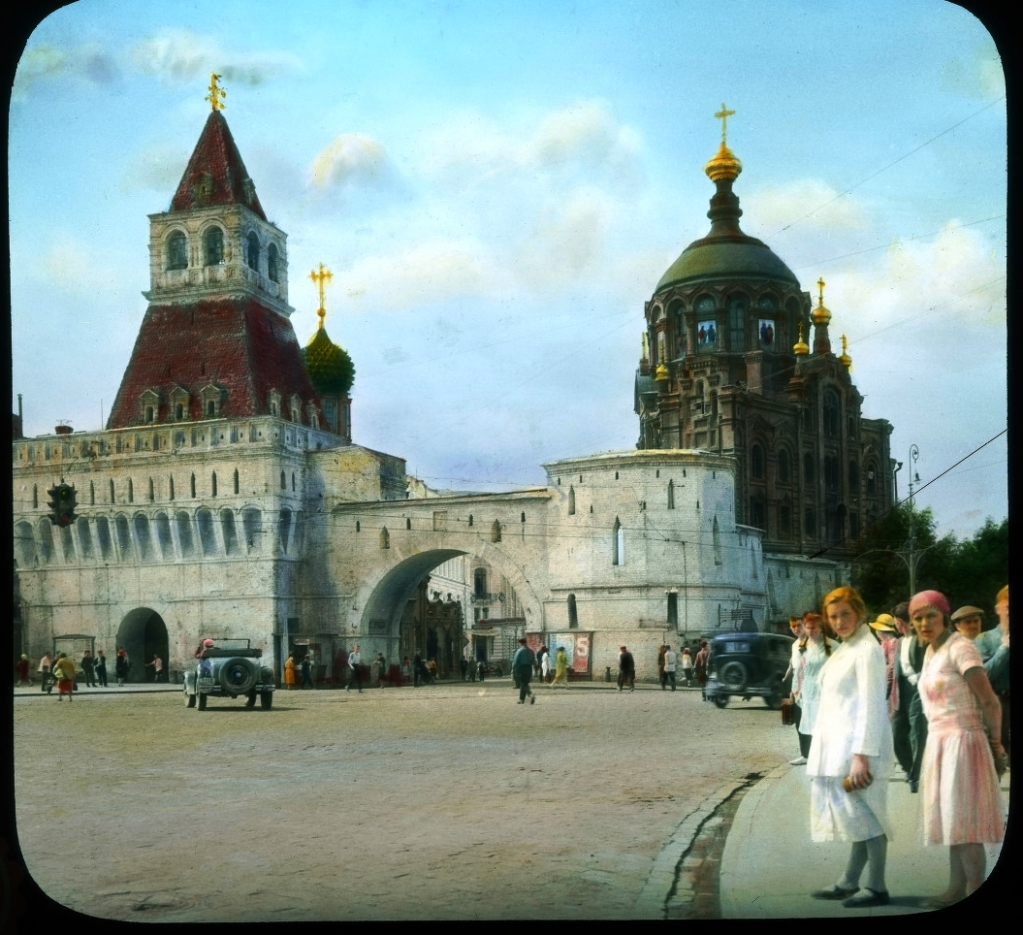 Москва. Владимирские ворота на Лубянской площади